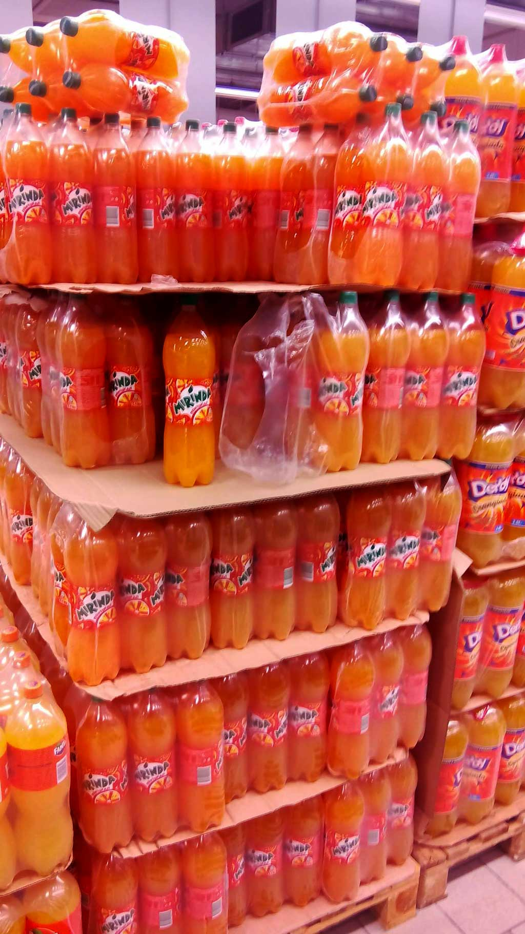 Mirinda á venda en Bulgaria.